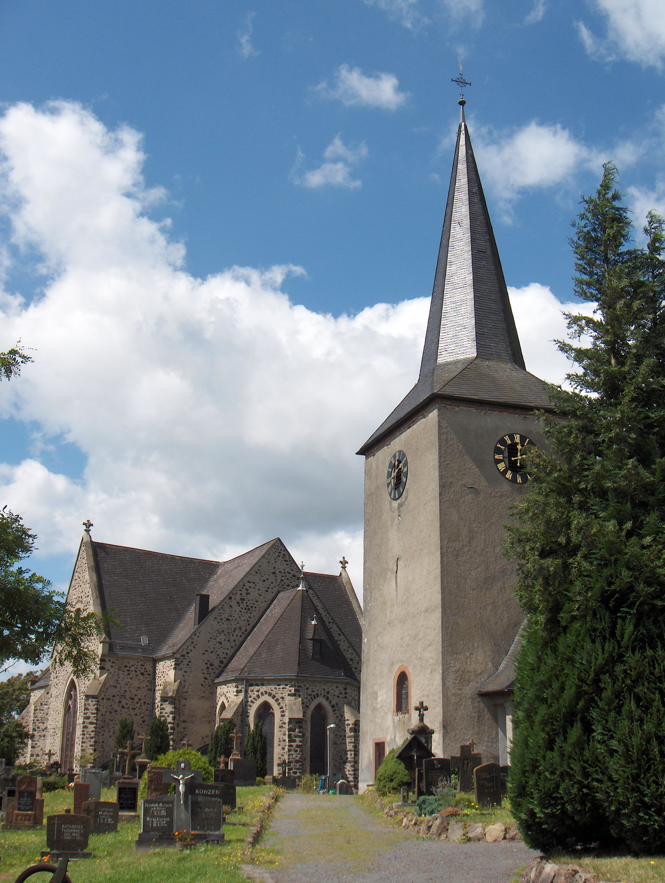 Gillenfeld (Rheinland-Pfalz), katholische Pfarrkirche St. Andreas, neugotisch (1899) (Glockenturm aus dem 14. Jh.)